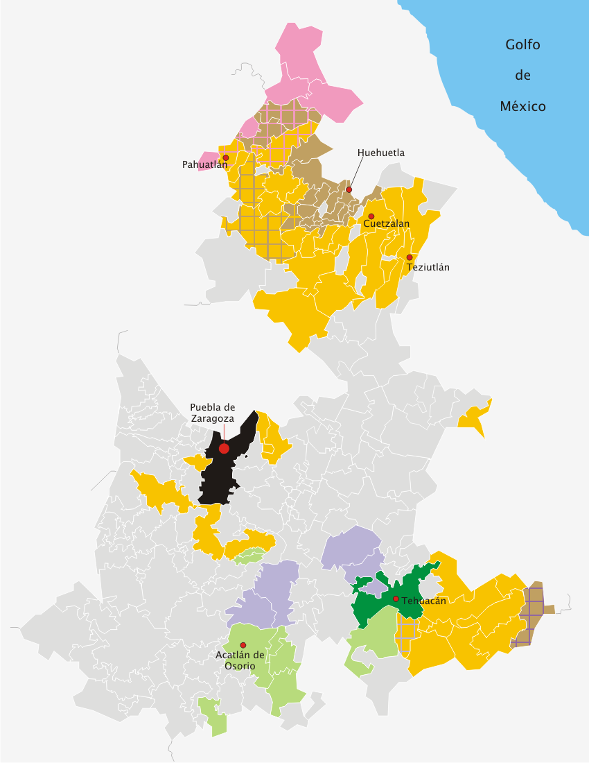 español (es): Mapa lingüístico del estado de Puebla. Náhuatl Totonaco Otomí Popoloca Mixteco Mazateco Área plurilingüe de náhuatl, otomí, mixteco, popoloca y totonaco Área plurilingüe de náhuatl, popoloca, mazateco y mixteco. English (en): Linguistic map of the State of Puebla (Mexico). Nahuatl Totonac Otomi Popoloca Mixtec Mazatec Multilingual area of Nahuatl, Otomi, Mixtec, Popoloca and Totonac Multilingual area of Nahuatl, Popoloca, Mazatec and Mixtec